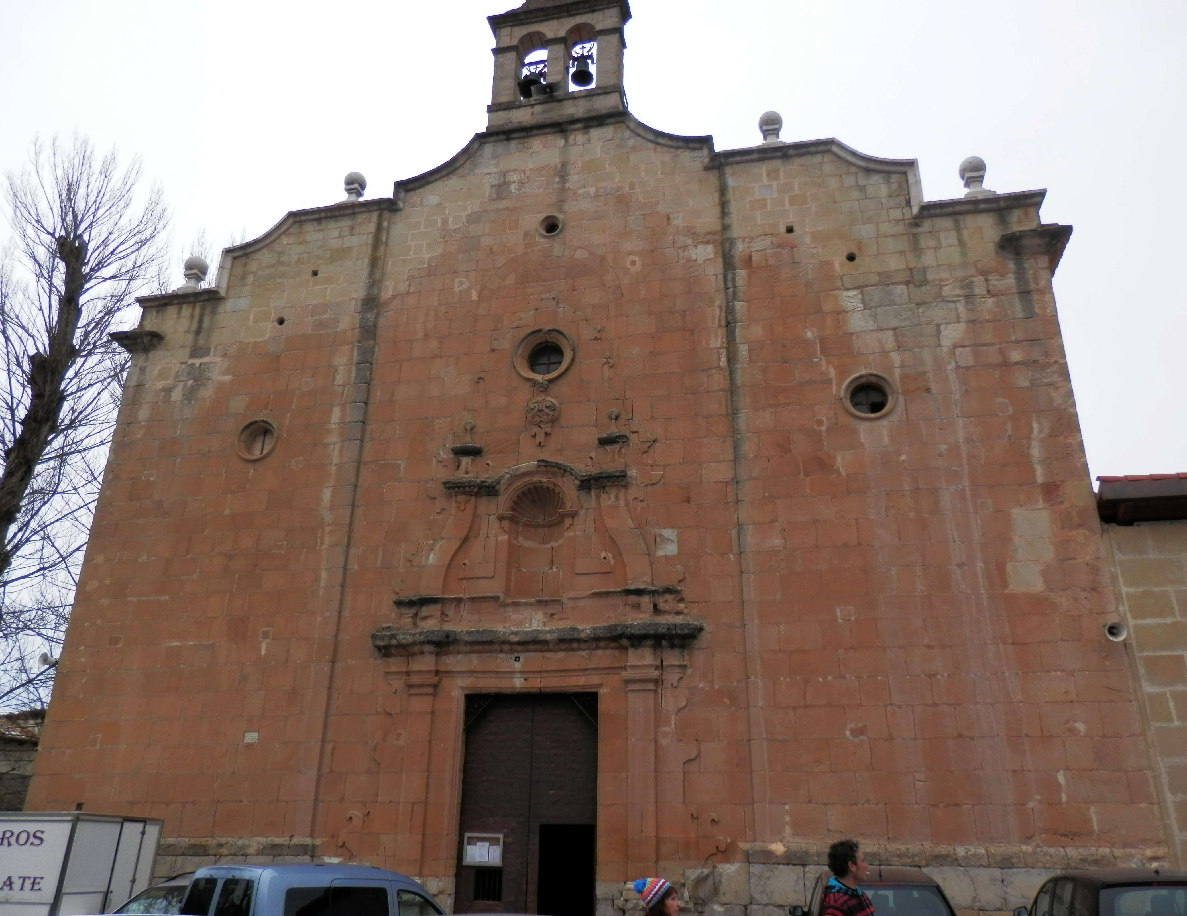 Façana del santuari de la Virgen de la Vega.